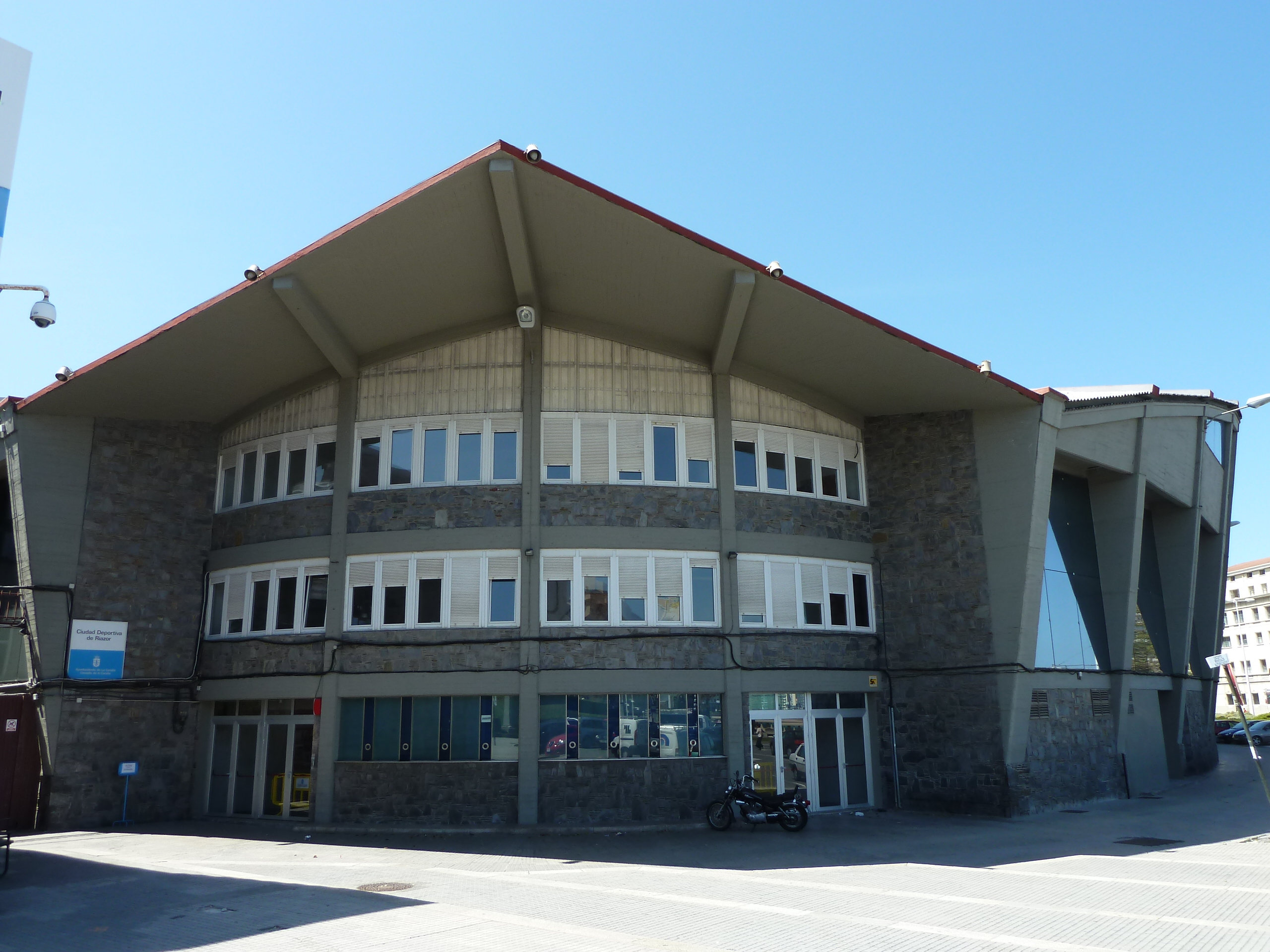 Pazo dos Deportes de Riazor na Coruña.